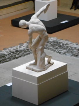 Discóbolo - Expo. Os corpos na Grécia Antiga - Fondation Gianadda - Martigny - Suíça